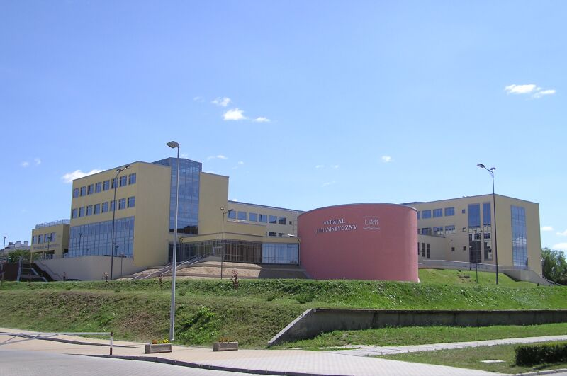 Uniwersytet Warmińsko-Mazurski w Olsztynie (Wydział Nauk Humanistycznych)